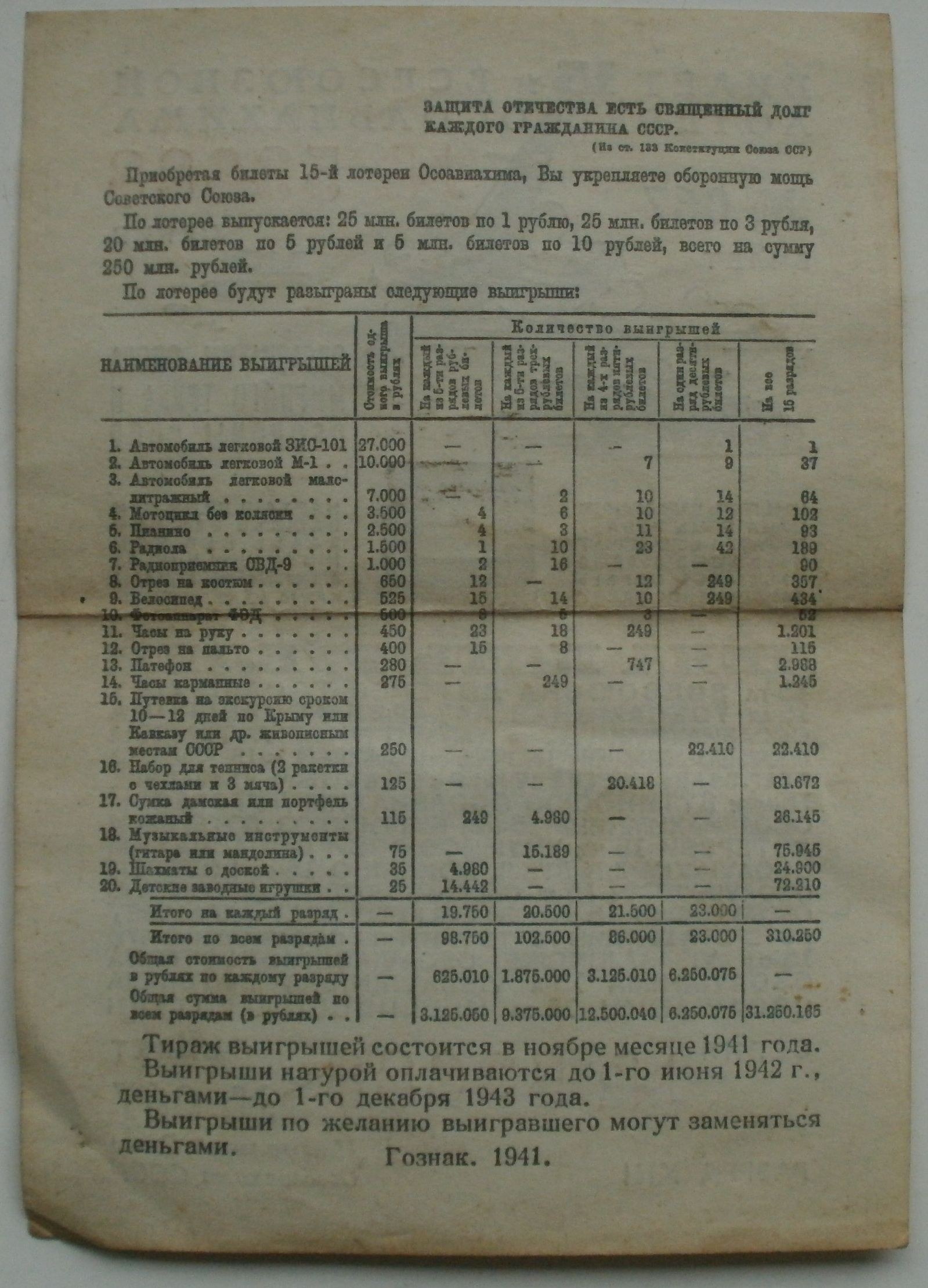 Лотерея ОСОАВИАХИМА.